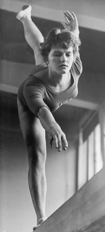 Birgit Radochla Zentralbild Kohls 27.8.1963 Mit 18 Jahren fünf Meistertitel - Birgit Radochla ist Neuwählerin. Fünf deutsche Meistertitel, den vierten Platz im Pferdsprung bei der Weltmeisterschaft 1962 in Prag sowie zahlreiche Siege in schweren internationalen Konkurrenzen - das weist die Statistik über eine Turnerin aus, die erst 18 Jahre alt ist und noch lange nicht auf dem Gipfel ihres Leistungsvermögens steht. Birgit Radochla (SC Dynamo Berlin) hat sich innerhalb von zwei Jahren an die Spitze der deutschen Turnerinnen gesetzt, und erst vor wenigen Tagen kehrte sie aus Budapest mit frischem internationalem Lorbeer zurück. In wenigen Wochen tritt Birgit Radochla nun zum ersten Mal an die Wahlurne. "Die Interessen aller Sportler liegen in unserem Staat in guten Händen. Ich verdanke meinen Aufstieg nicht nur der großzügigen Förderung, die der Sport in der DDR genießt. Doch wichtiger ist, daß sich unsere Regierung immer wieder unermüdlich für die Erhaltung des Friedens einsetzt, daß ich mich weiter im friedlichen Wettkampf mit meinen Sportfreundinnen in allen Ländern messen kann", sagte Birgit Radochla. (Näheres siehe ADN-Meldung Nr. 600 - 603 vom 27.8.63) UBz: Birgit Radochla auf dem Schwebebalken.